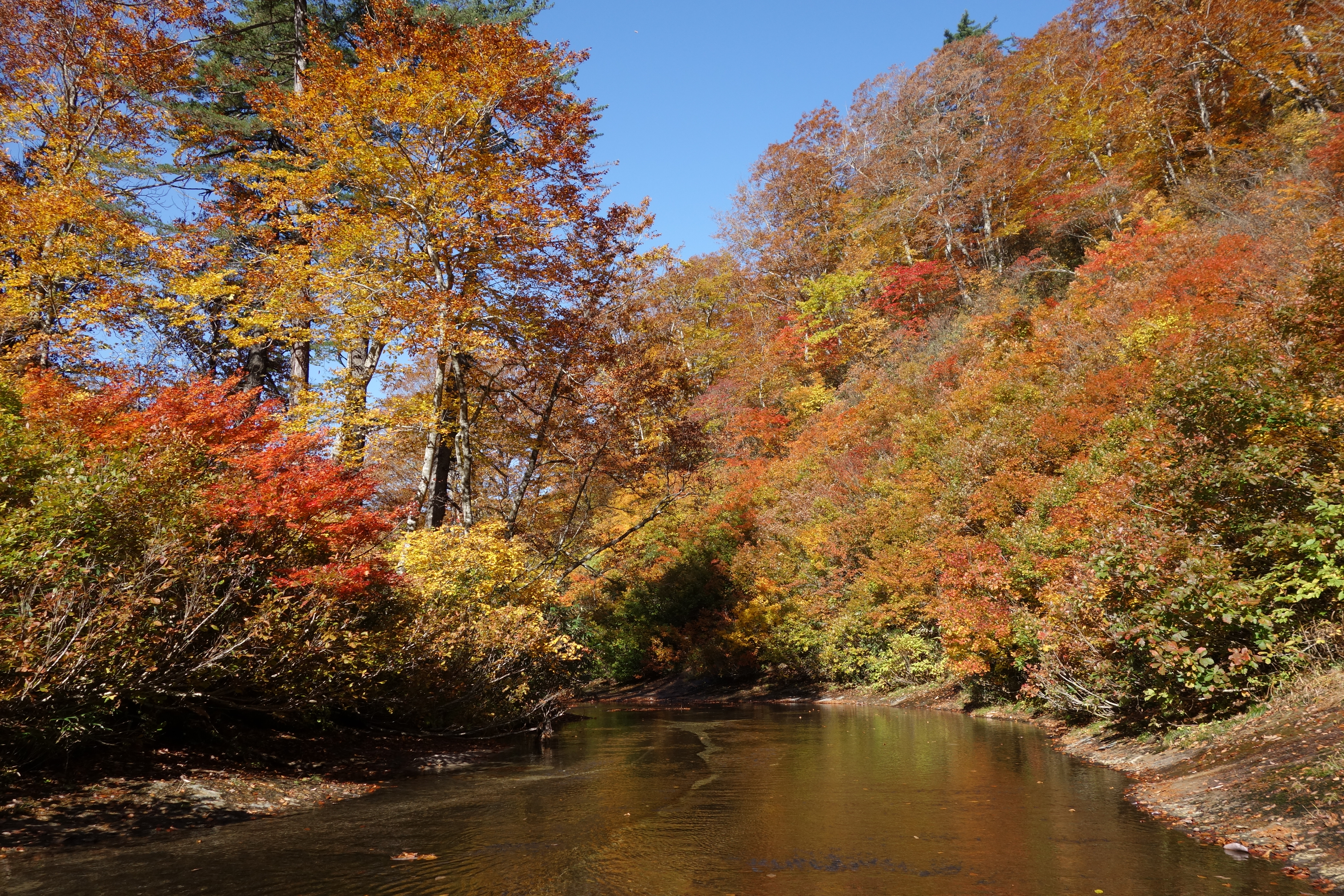 赤水渓谷その２ Sony Cyber-shot DSC-RX100